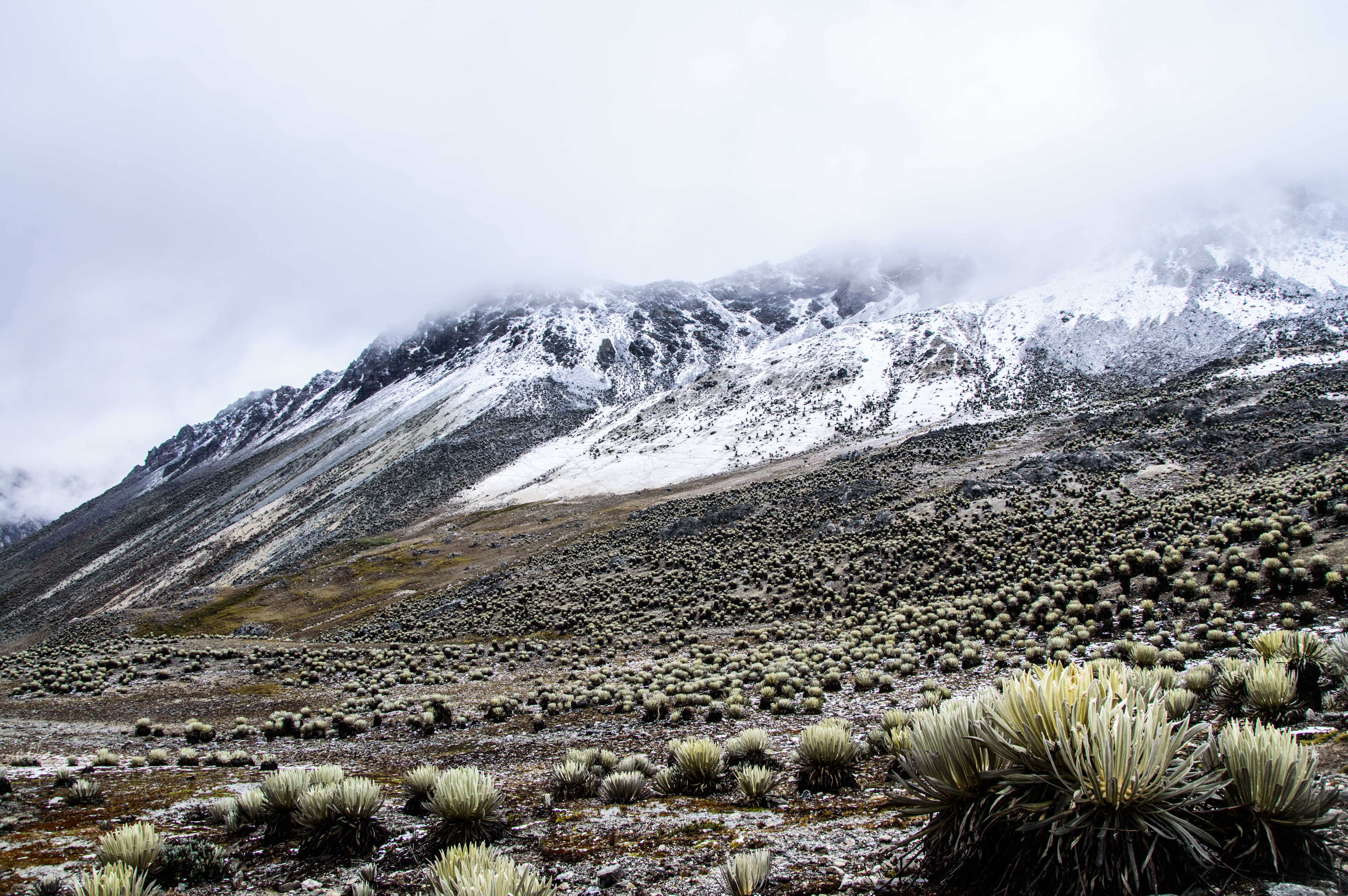 Valle de Mifafí en el Parque nacional Sierra de la Culata, Venezuela